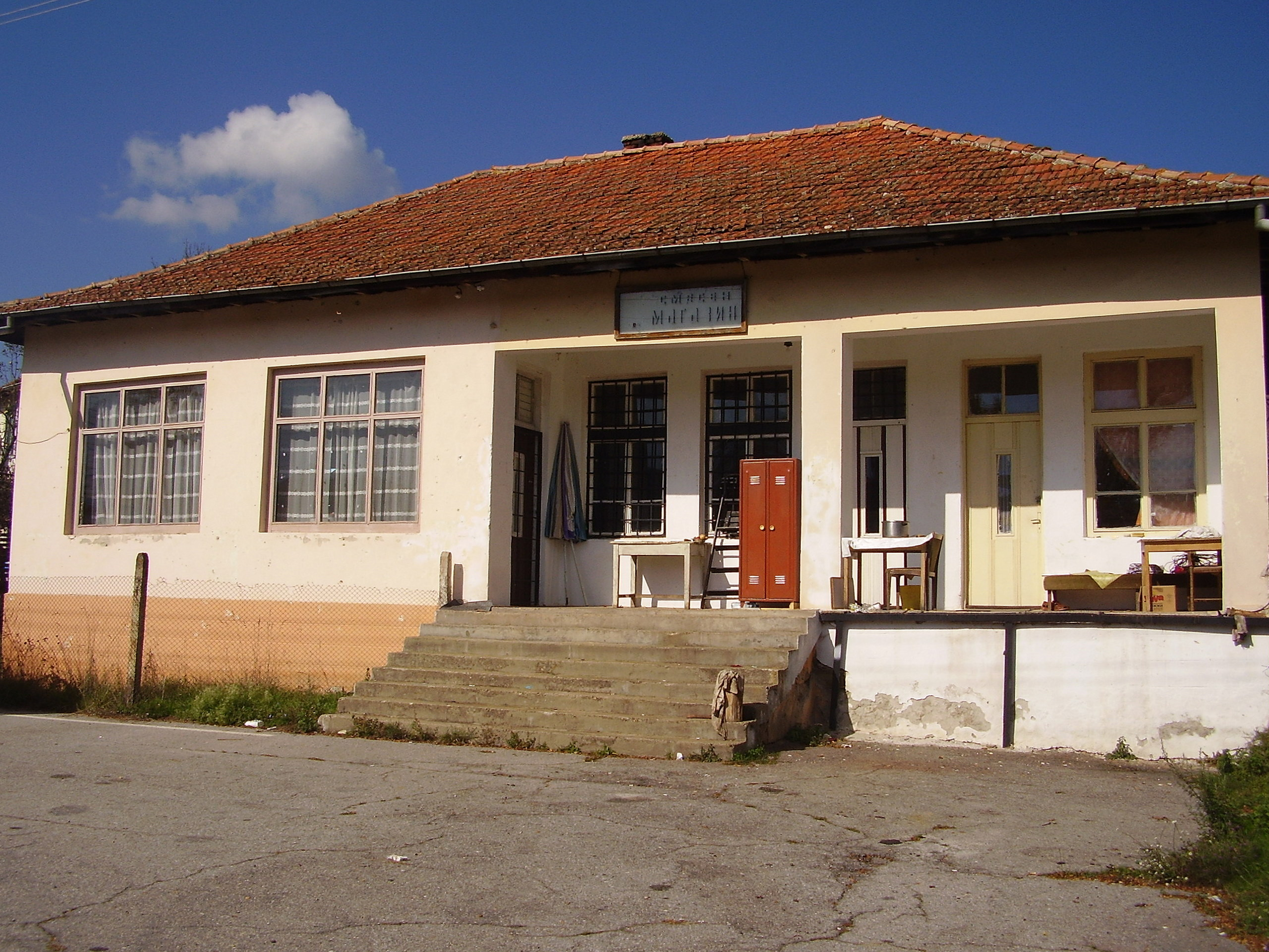 Смесения магазин - с. Преколница.